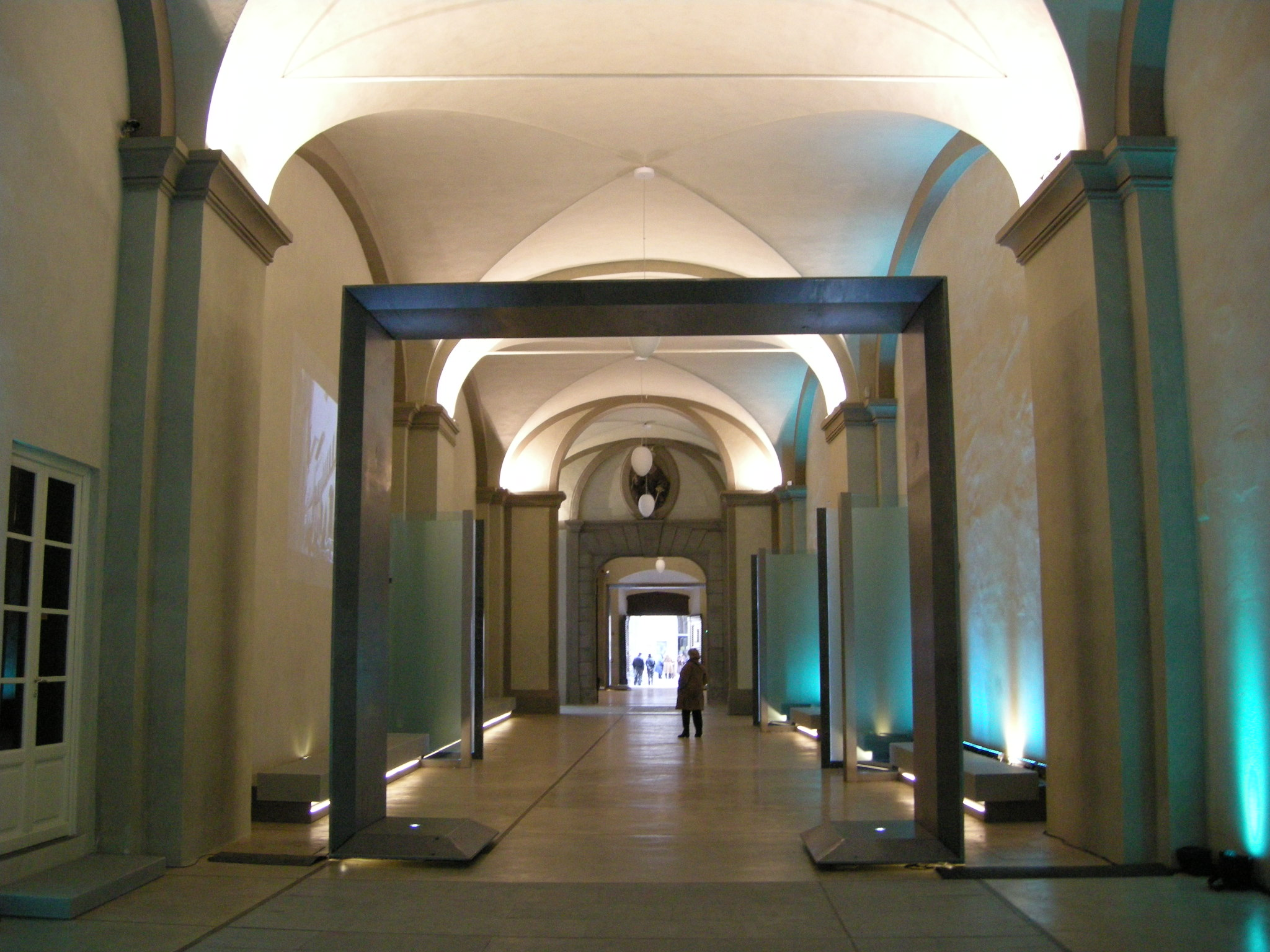 Corridoio palzzo medici riccardi